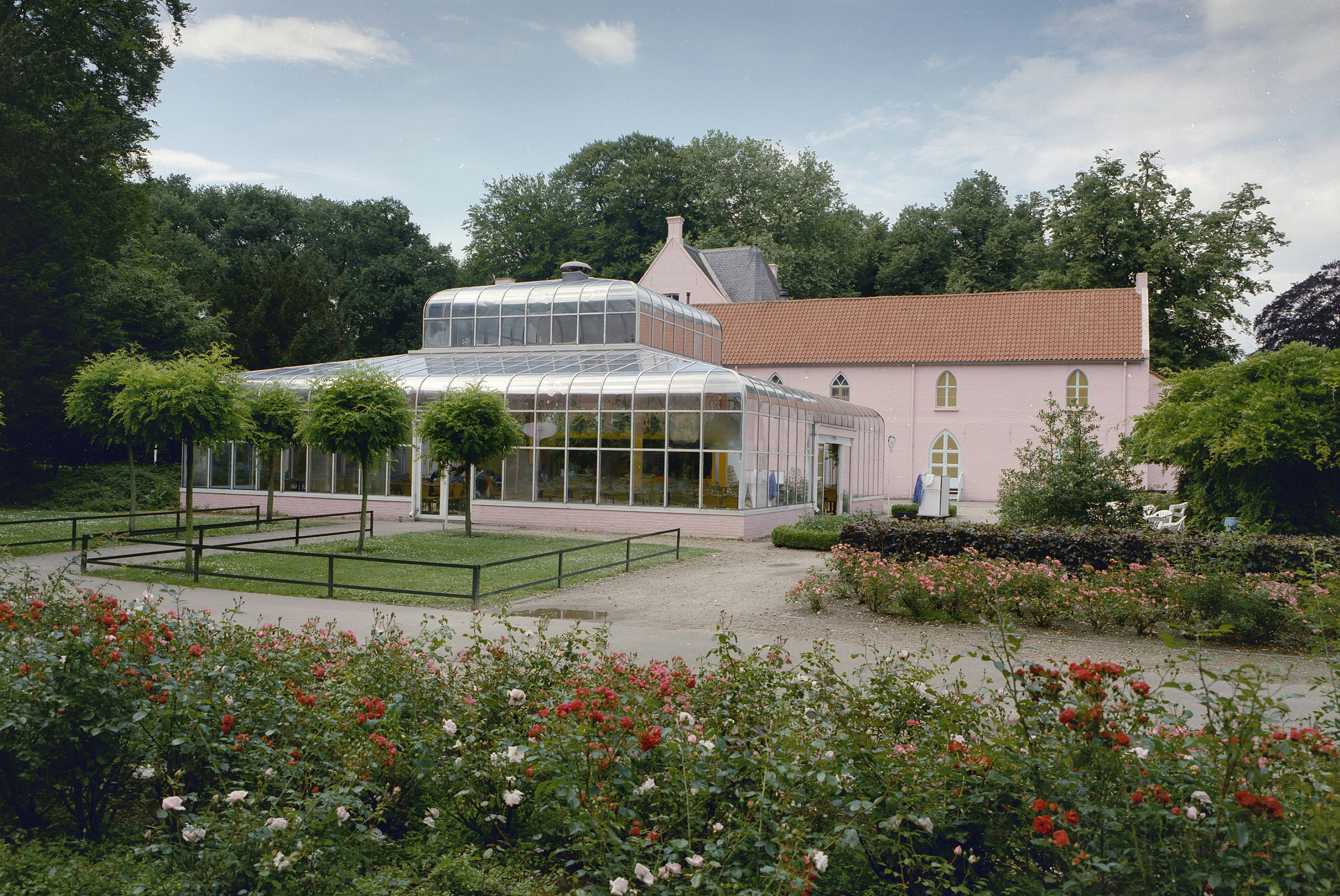 Kasteel Doultremont: Exterieur OVERZICHT ACHTERGEVEL